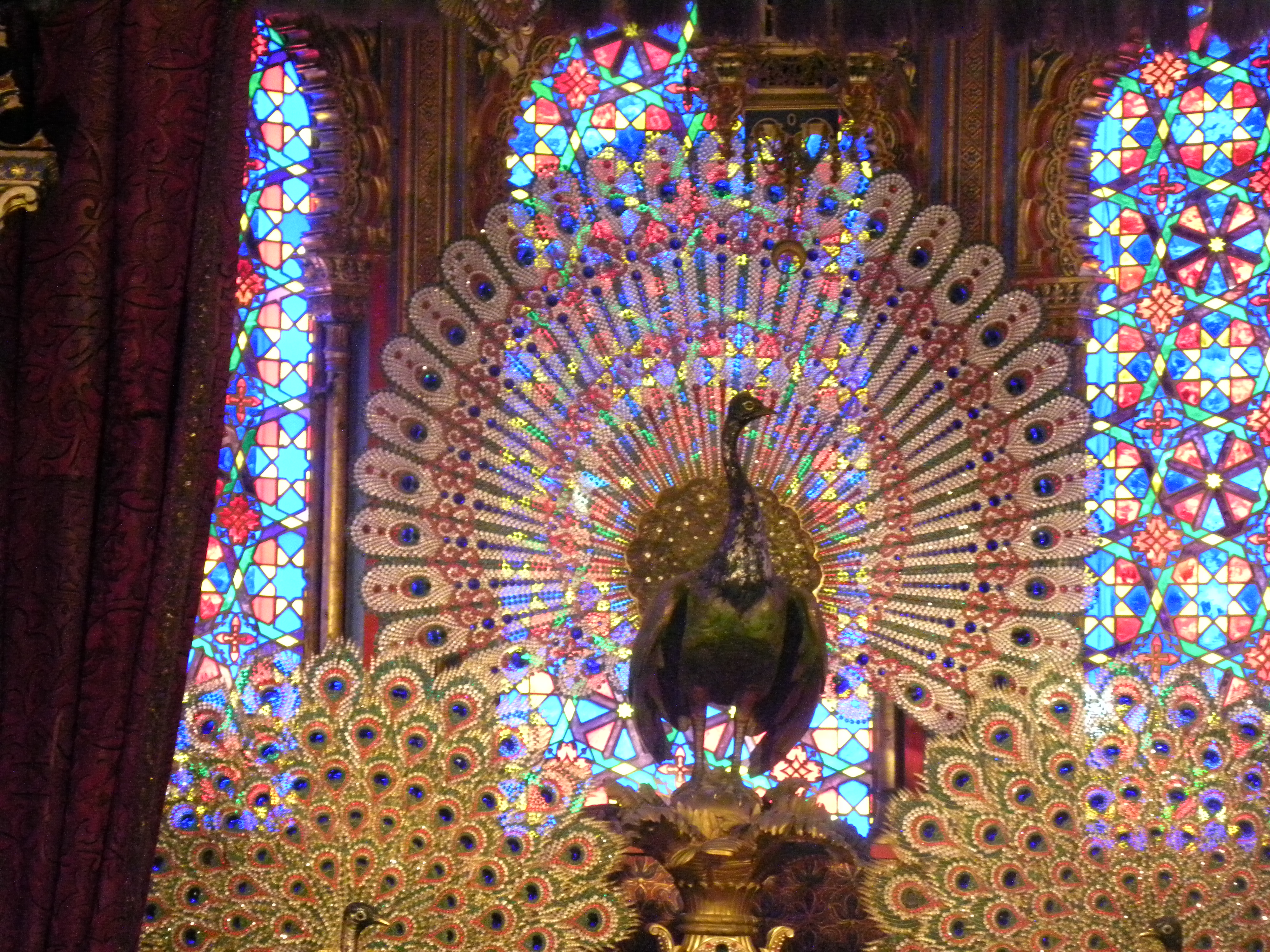 Linderhof, Maurischer Pavillon, Foto: A. d´Orfey, Kunst im Licht, München 2006